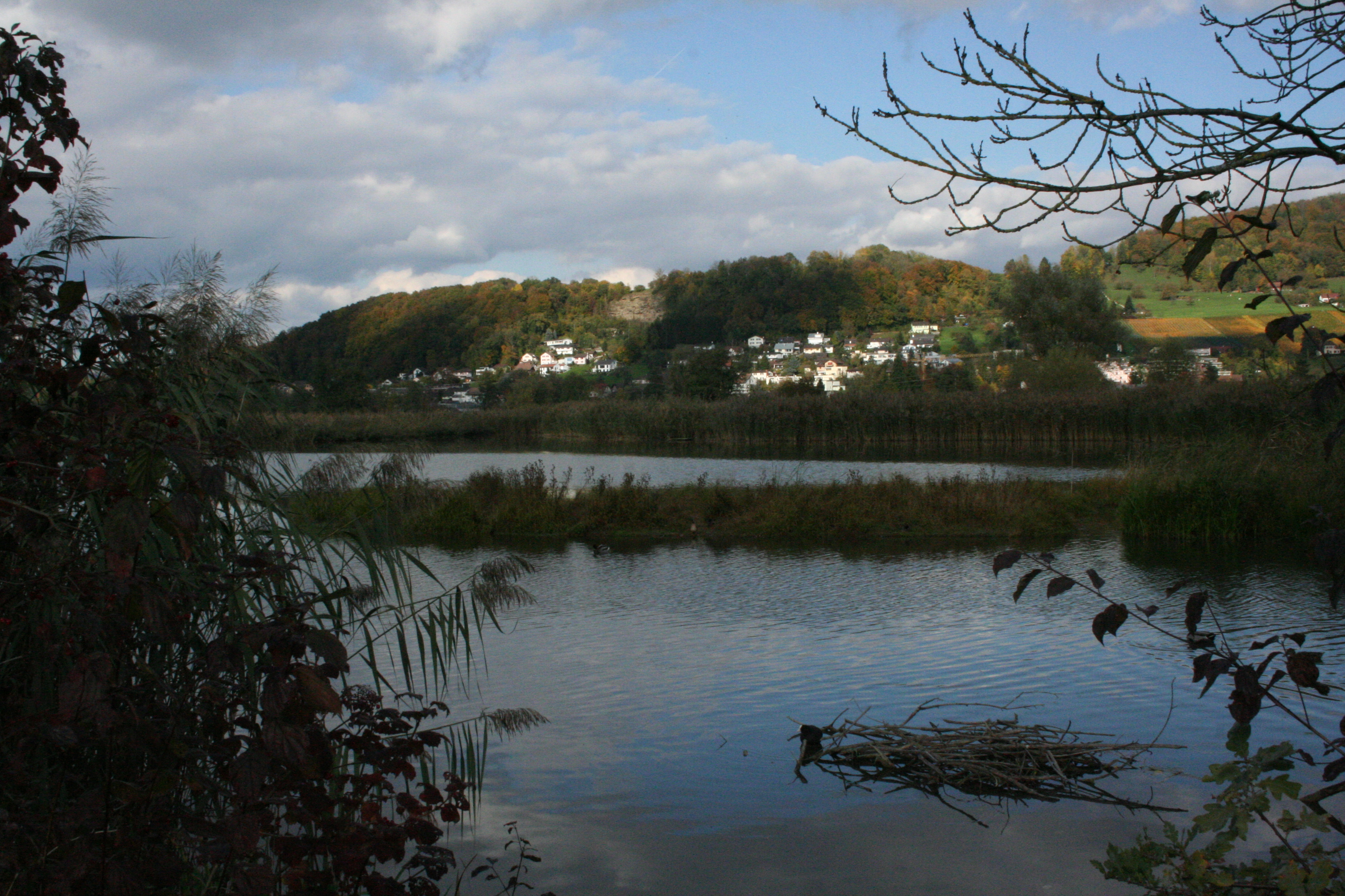 Klingnauer Stausee